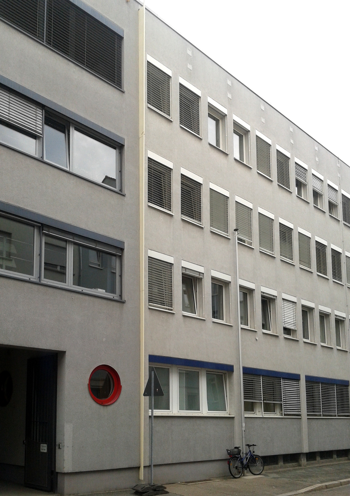 Wasser- und Schifffahrtsamt Mannheim, C8, 3